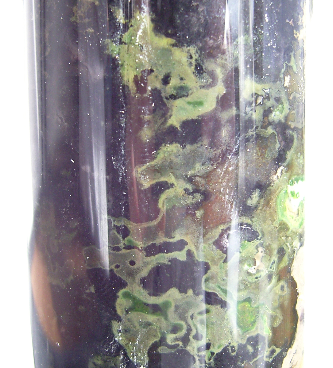 Grüne Schwefelbakterien (Chlorobiaceae) im unteren Bereich einer Winogradsky-Säule